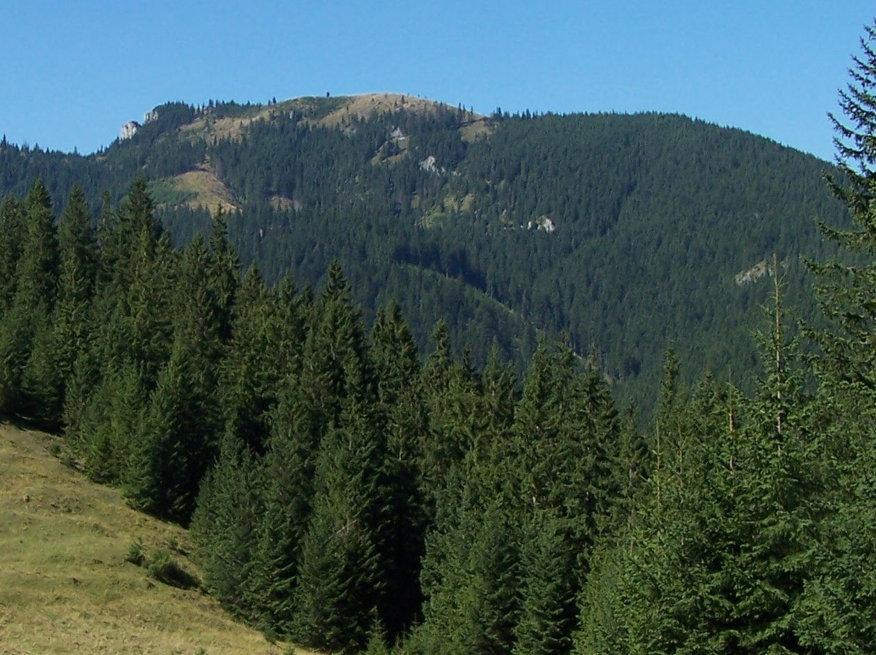 Widok z Polany Jamy na Furkaskę, Tyrałową Czubę i Dolinę Krytą